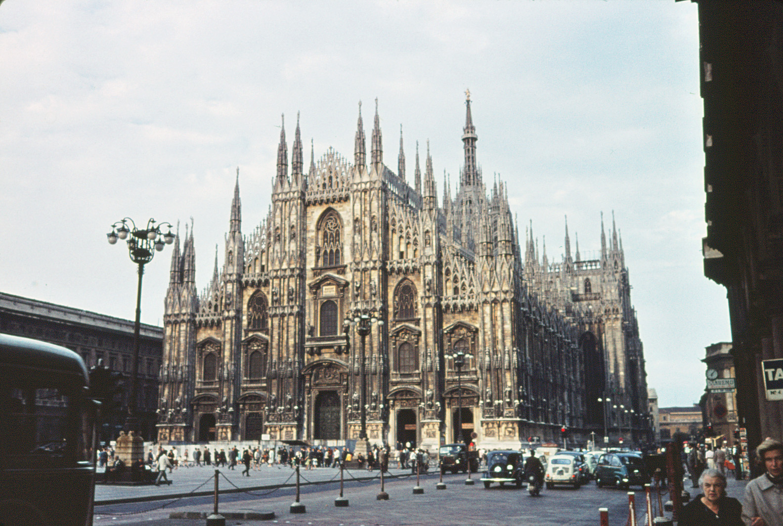 La cathédrale de Milan en 1962